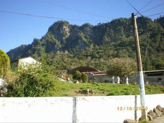 La localidad de Santa María Temaxcalapa está situado en el Municipio de Tenango de Doria (en el Estado de Hidalgo). Tiene 575 habitantes. Santa María Temaxcalapa está a 1000 metros de altitud Es la Localidad mas importante de la Región Otomie-Tepehua ya que en esta zona se encuentras fábricas de café, al igual que cuenta con la única gasolinera y gasera que hay en esta zona rural.